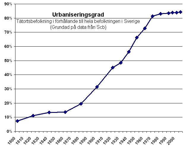 Urbaniseringsgrad i Sverige (tätortsbefolkning i förhållande till hela befolkningen). Data från Scb